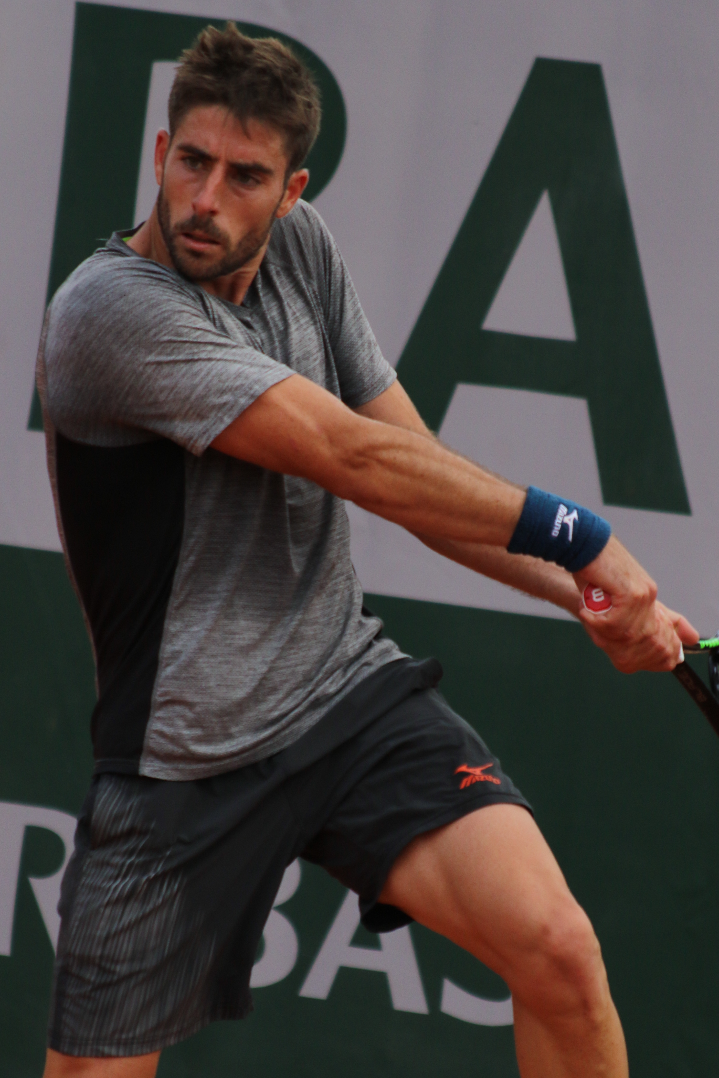 Lopez Perez RGQ19 (10)